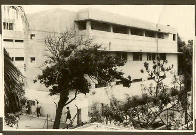 הבניין הישן של בית הספר א.ד.גורדון ברחוב לסל 7 בתל אביב